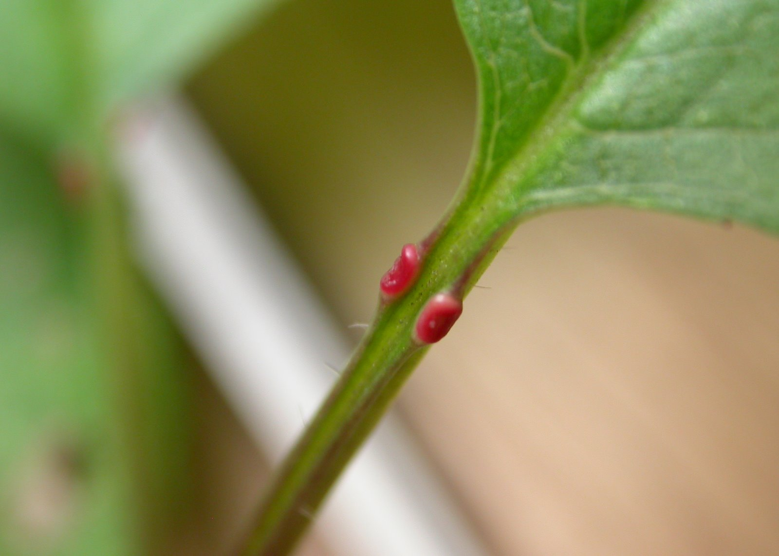 Glandes rouges caractéristiques du Prunus avium